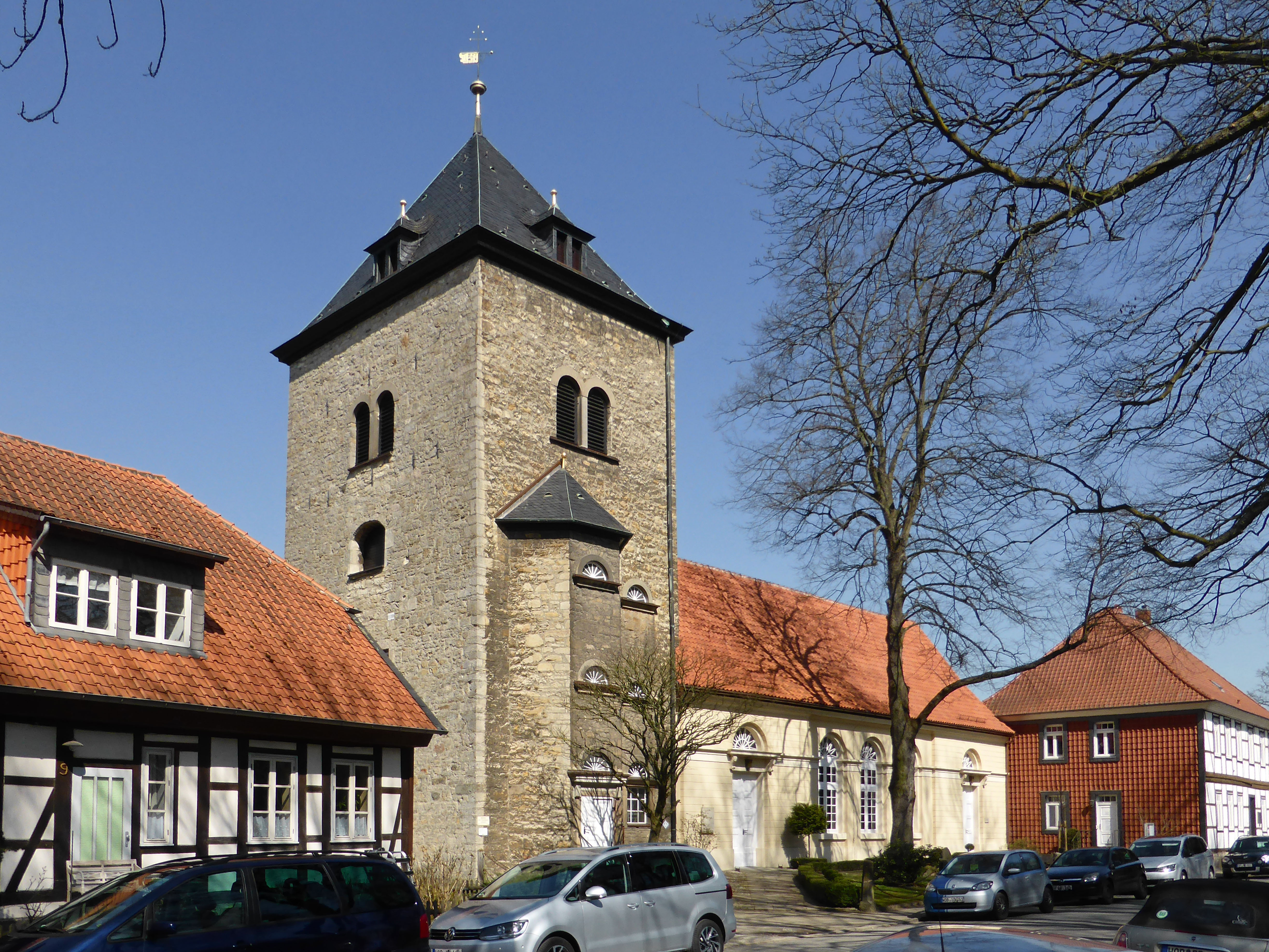 Marienkirche in Alt-Wolfsburg